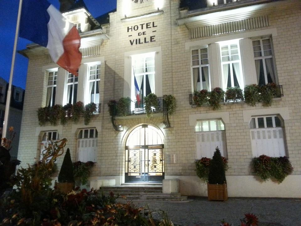 La Mairie, vue de nuit.